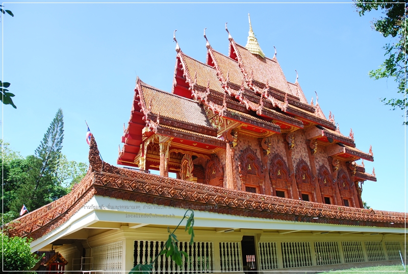 พระอุโบสถวัดภูเขาแก้ว อ.พิบูลมังสาหาร จ.อุบลราชธานี